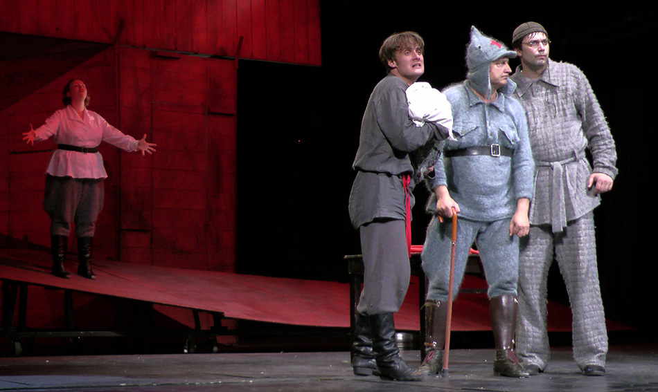 Сцена из спектакля МДТ им. Н.В. Гоголя "Дураки на периферии" (по пьесе А. Платонова): Ащеулов - Александр Хатников, Евтюшкин - Андрей Зайков, Лутьин - Алексей Бирюков; реж. С. Яшин, 2012 г.